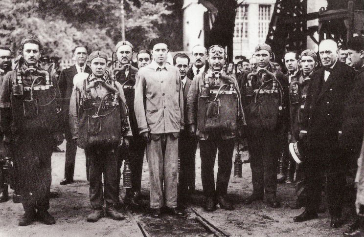 Visita de D. Alfonso de Borbón al pozo Fondón el 28/08/1925, posando con directivos de Duro Felguera y brigadistas